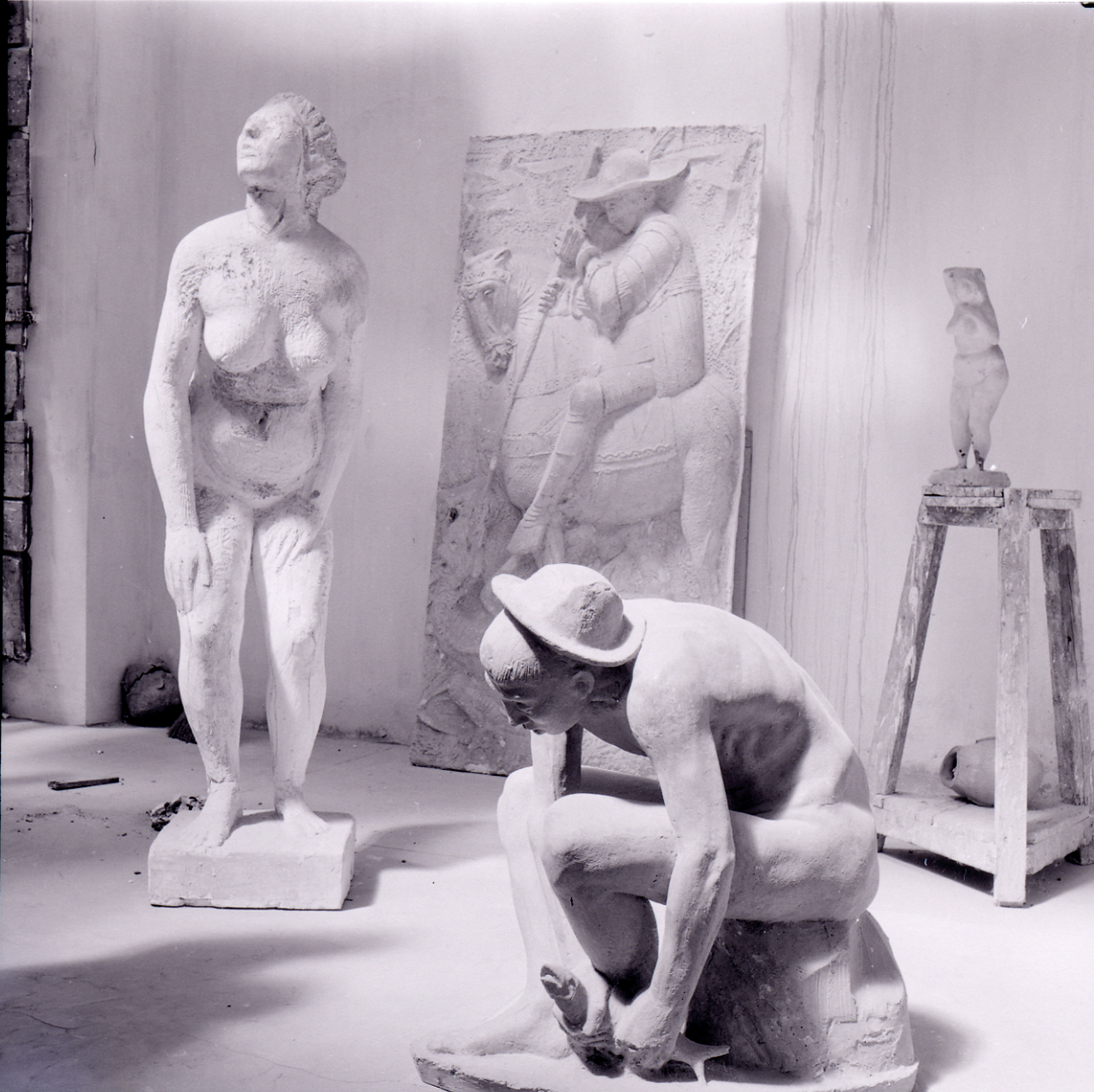 Servizio fotografico : Rimini, 1956 / Paolo Monti. - Buste: 9, Fototipi: 9 : Negativo b/n, gelatina bromuro d'argento/ pellicola ; 6x6. - ((Serie costituita da 9 buste di carta identificate con i nn.: R14996/7, R14997/8, R14998/8bis, R14999/9, R15000/10, R15001, R15002, R15003, R15004. - Le buste sono tenute insieme da una graffetta ad altre 6 buste di negativi di formato maggiore, che vengono catalogati come altra serie. La serie completa quindi comprende i negativi R14990-15004. - Fonte: Quaderno di Paolo Monti: s.t. [Soggetti e committenti] (1956-1961), presso Archivio Paolo Monti